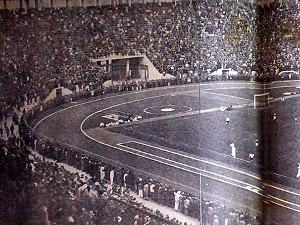 Primeira partida disputada entre Corinthians e Palestra Itália no Estádio do Pacaembu